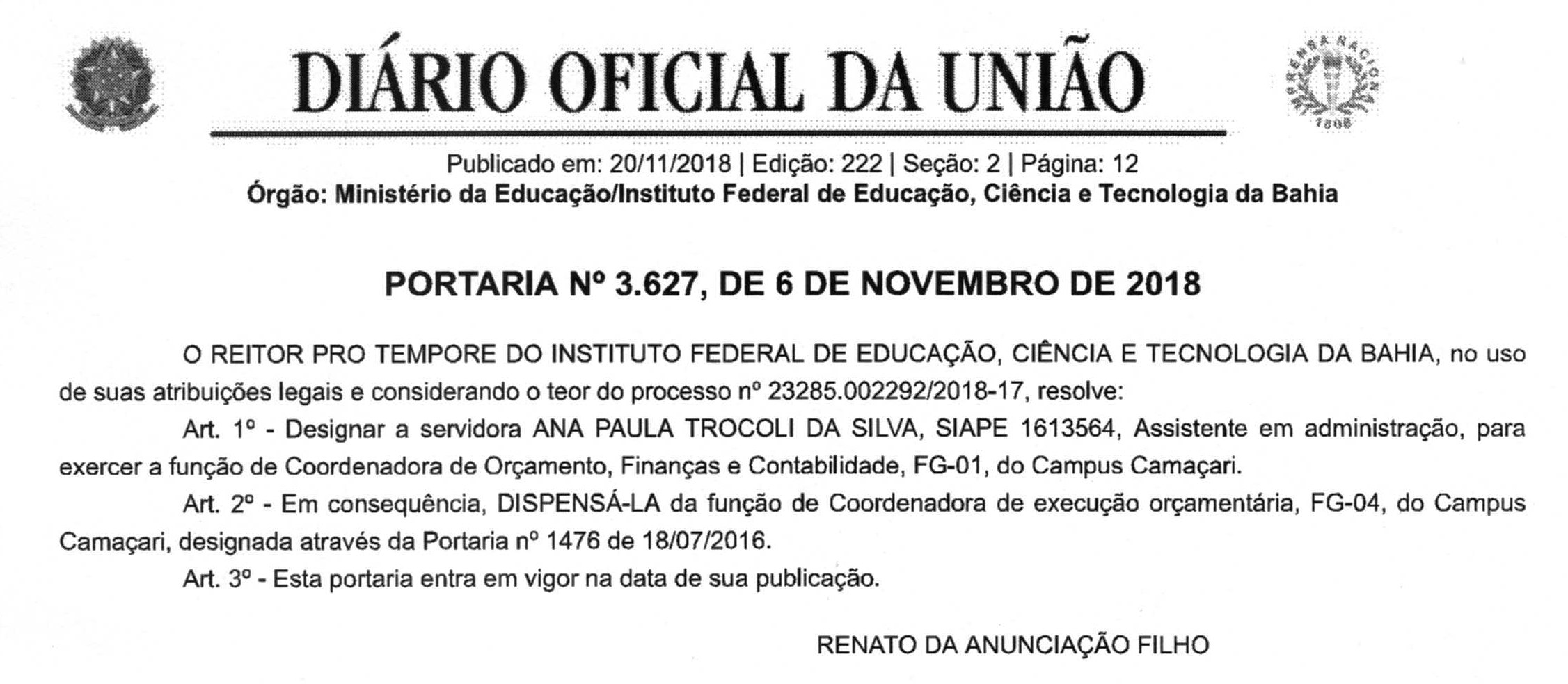 Portaria do IFBA.